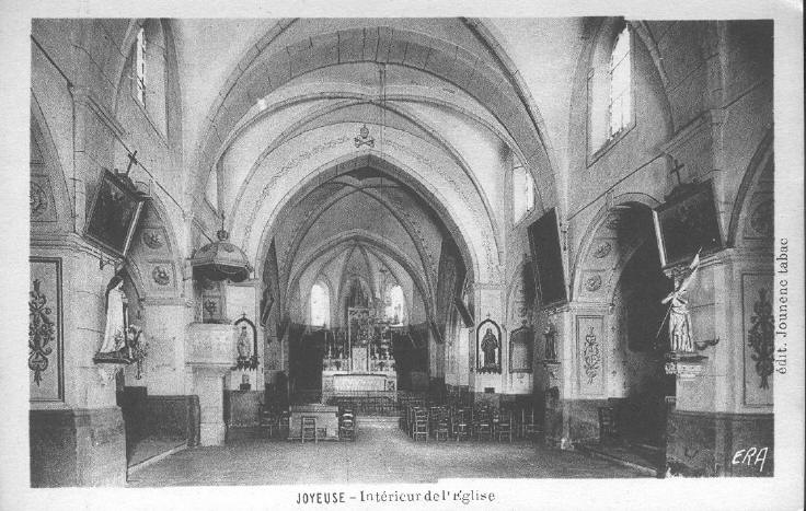 L'intérieur de l'église de Joyeuse (Ardèche) tel qu'il existait entre 1840 et 1960